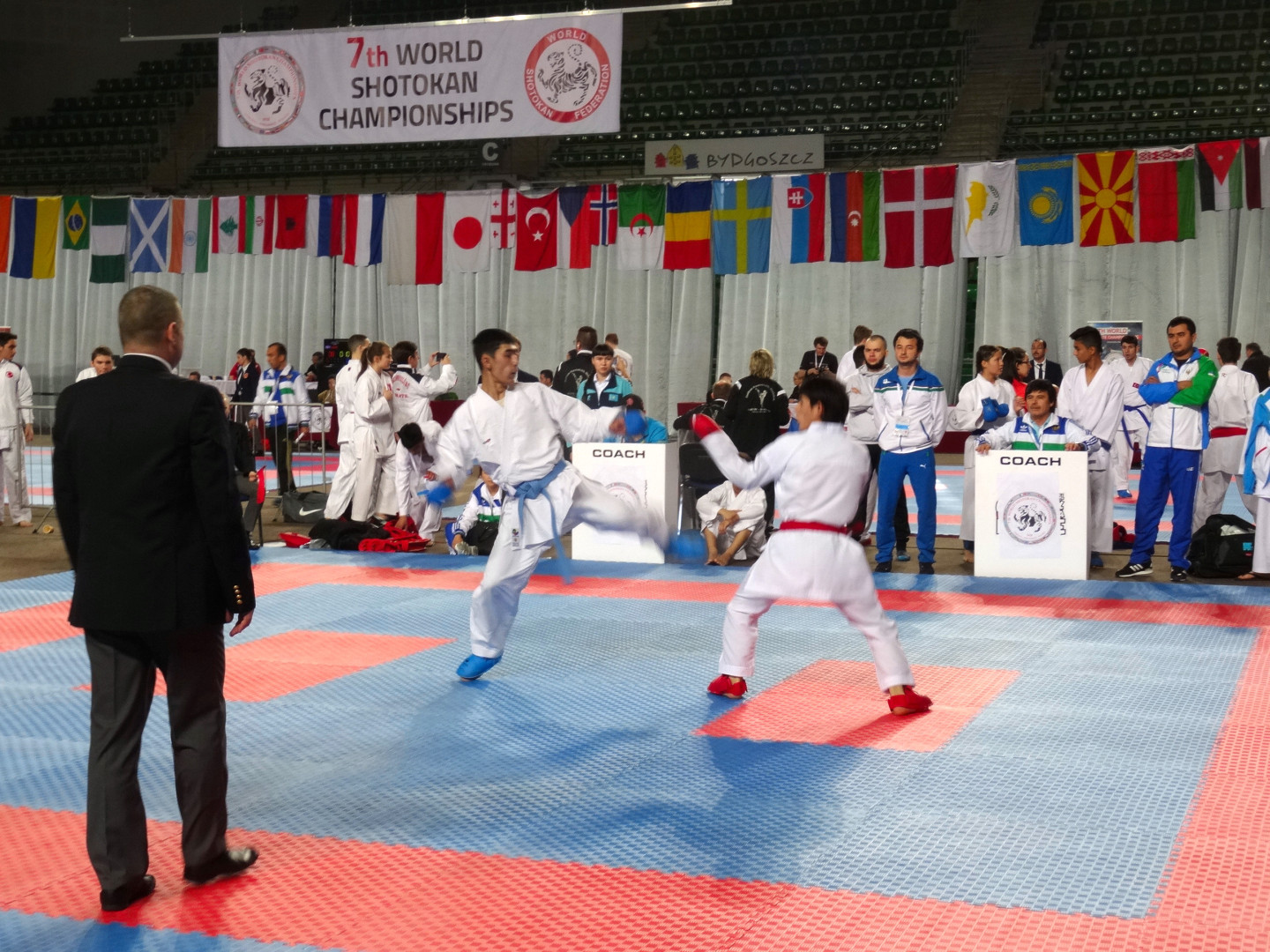 Mistrzostwa Świata Karate Shotokan w Bydgoszczy 1-3 kwietnia 2016 w hali Łuczniczka